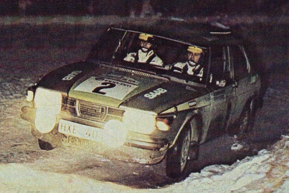 Stig Blomqvist, en janvier 1975 sur Saab 99 EMS (1er du AT-HUS Trofen, Suède), 'Super Auto Panini', figurina n°42.